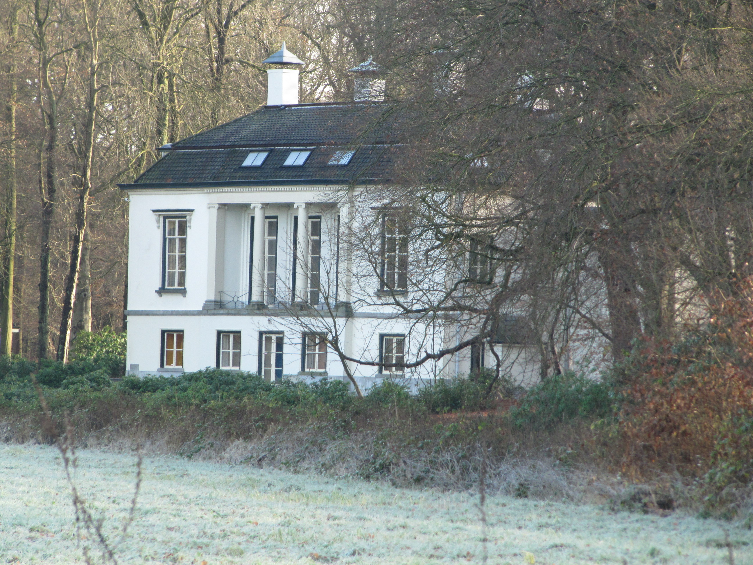 RM529894 Ewijckshoeve.jpg